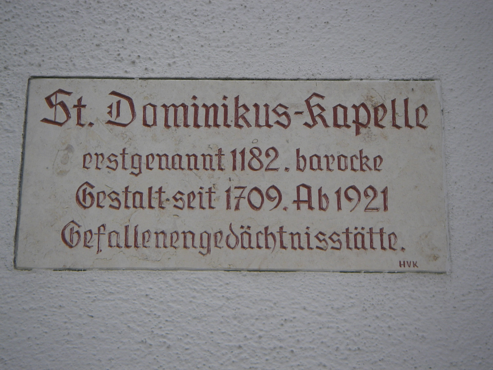 St. Dominikus Church, Kaufbeuren, Bavaria, Germany